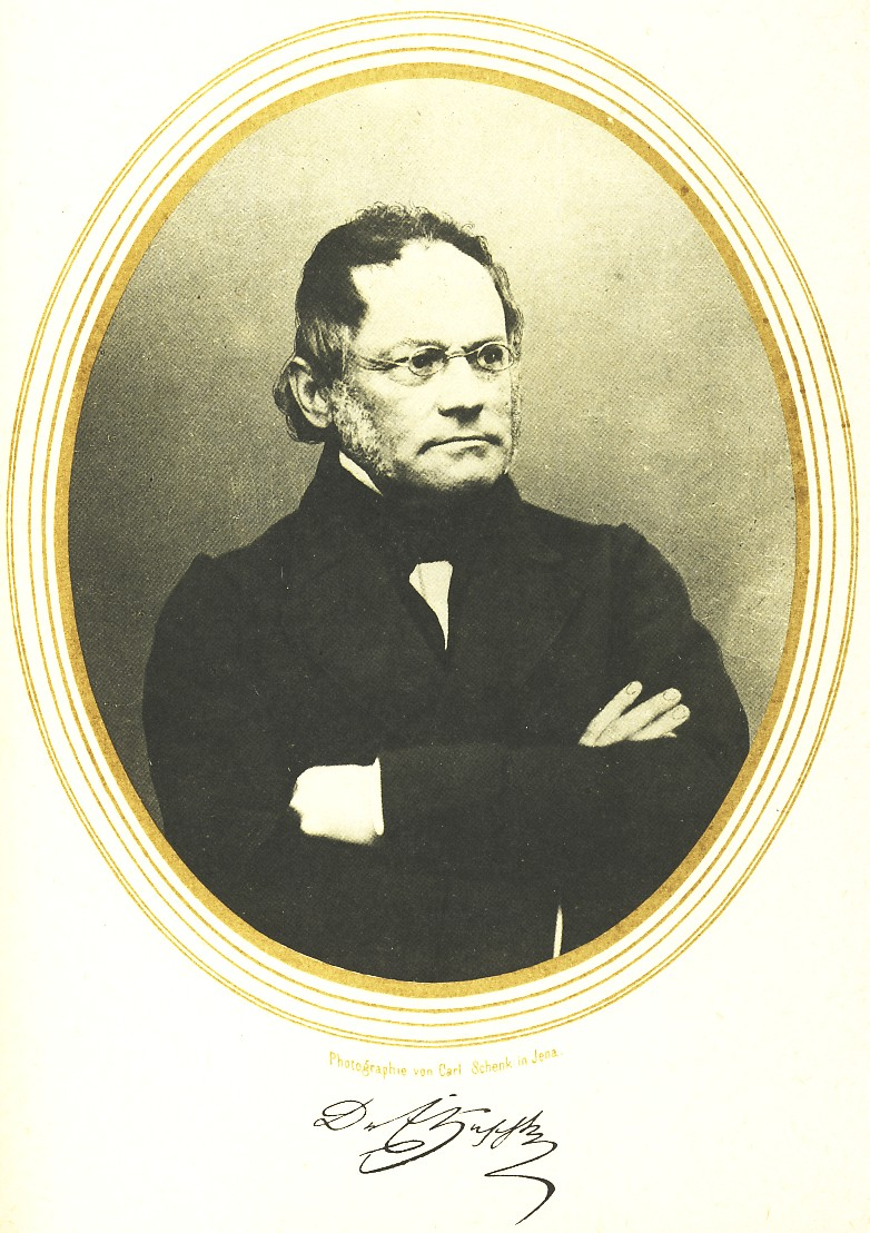 Porträt des Mediziners Emil Huschke; Fotografie von Carl Schenk (1813–1874)